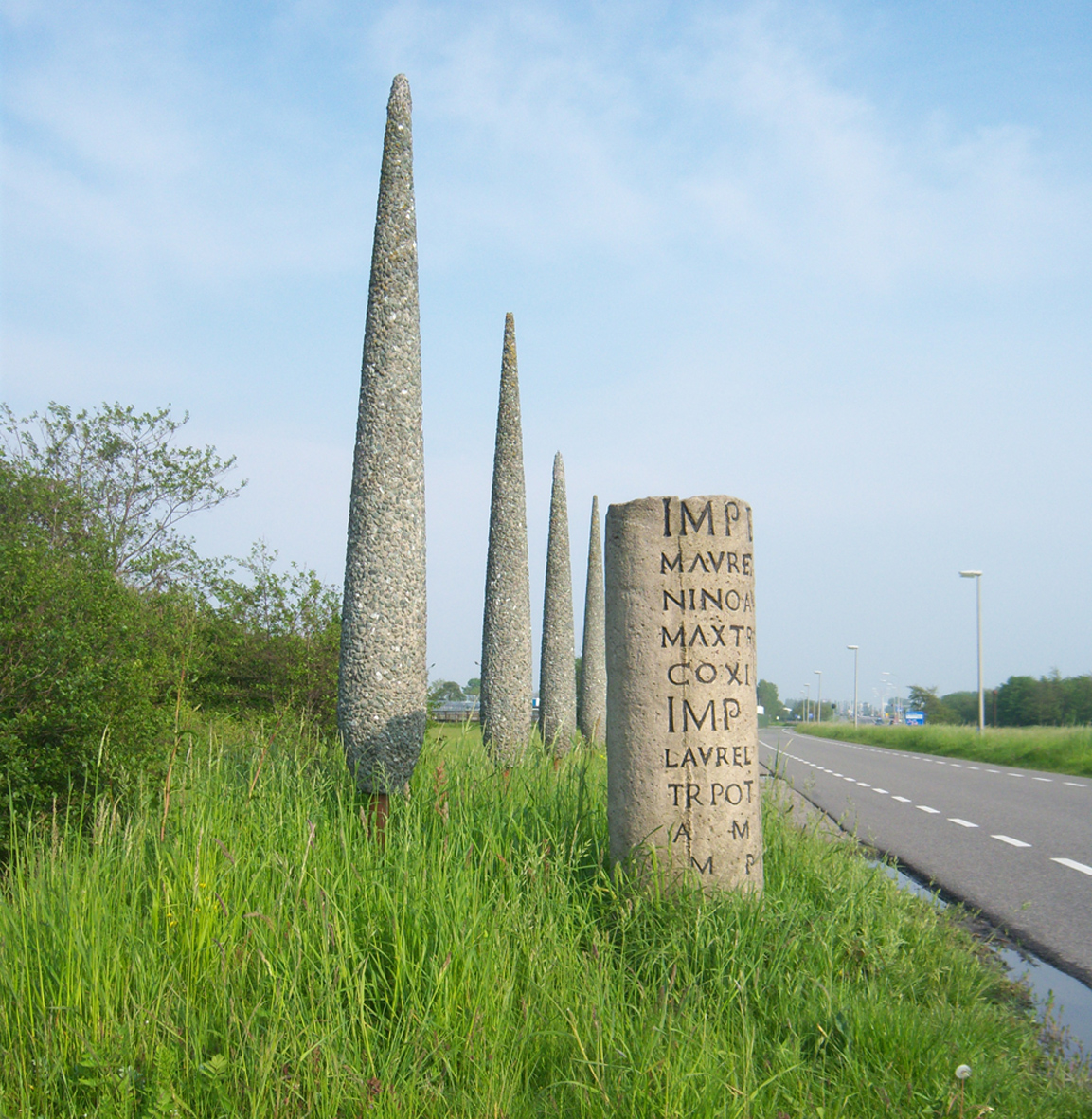 Mijlpaal langs de Torenvlietslaan in Valkenburg ZH. De mijlpaal is een kopie van de Romeinse mijlpaal die rond 1500 is gevonden bij Monster of Naaldwijk. Het origineel staat in het Rijksmuseum van Oudheden in Leiden.